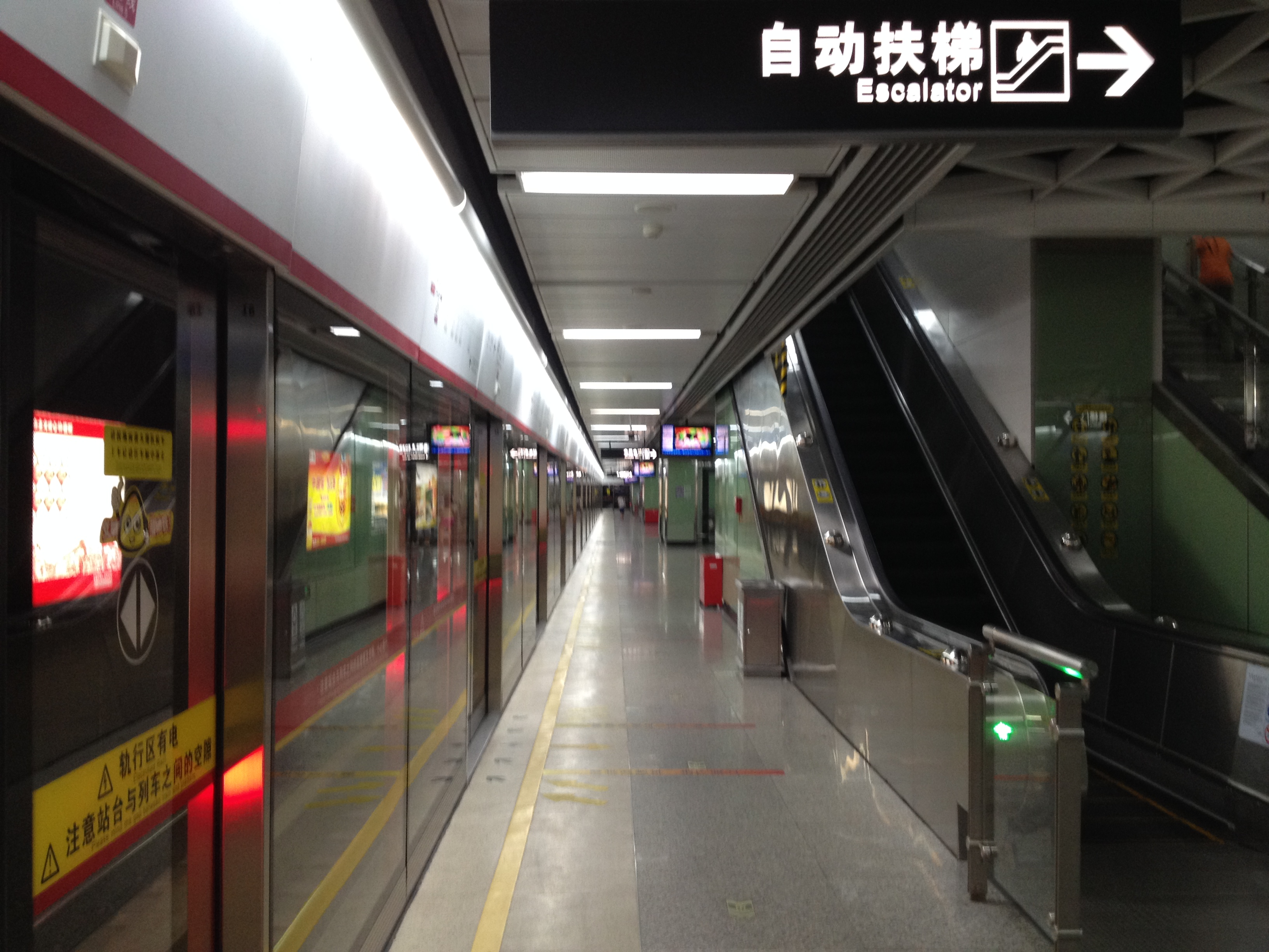 广州地铁中山八站月台